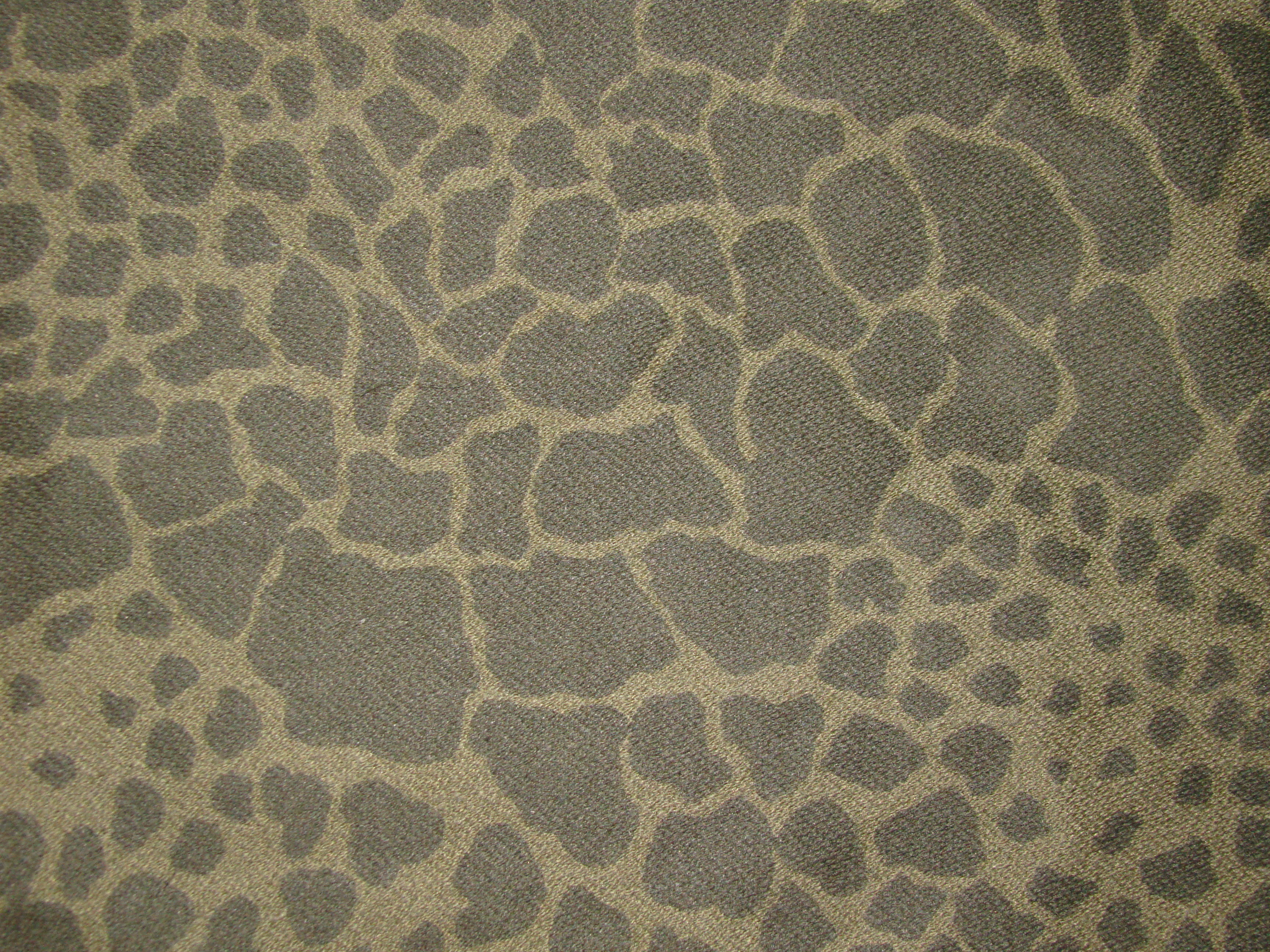 Kamuflaż wz. 89 "Puma"